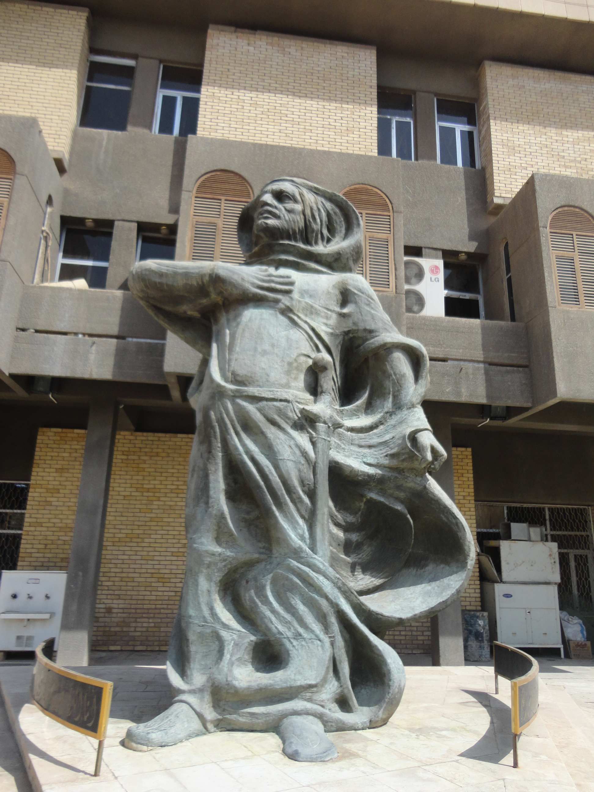 تمثال المتنبي في بغداد امام دار الكتب و الوثائق